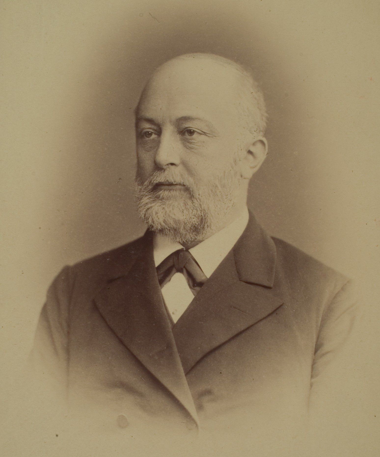 Carl Franz Otto Karlowa, Jurist, 1872–1904 Professor in Heidelberg